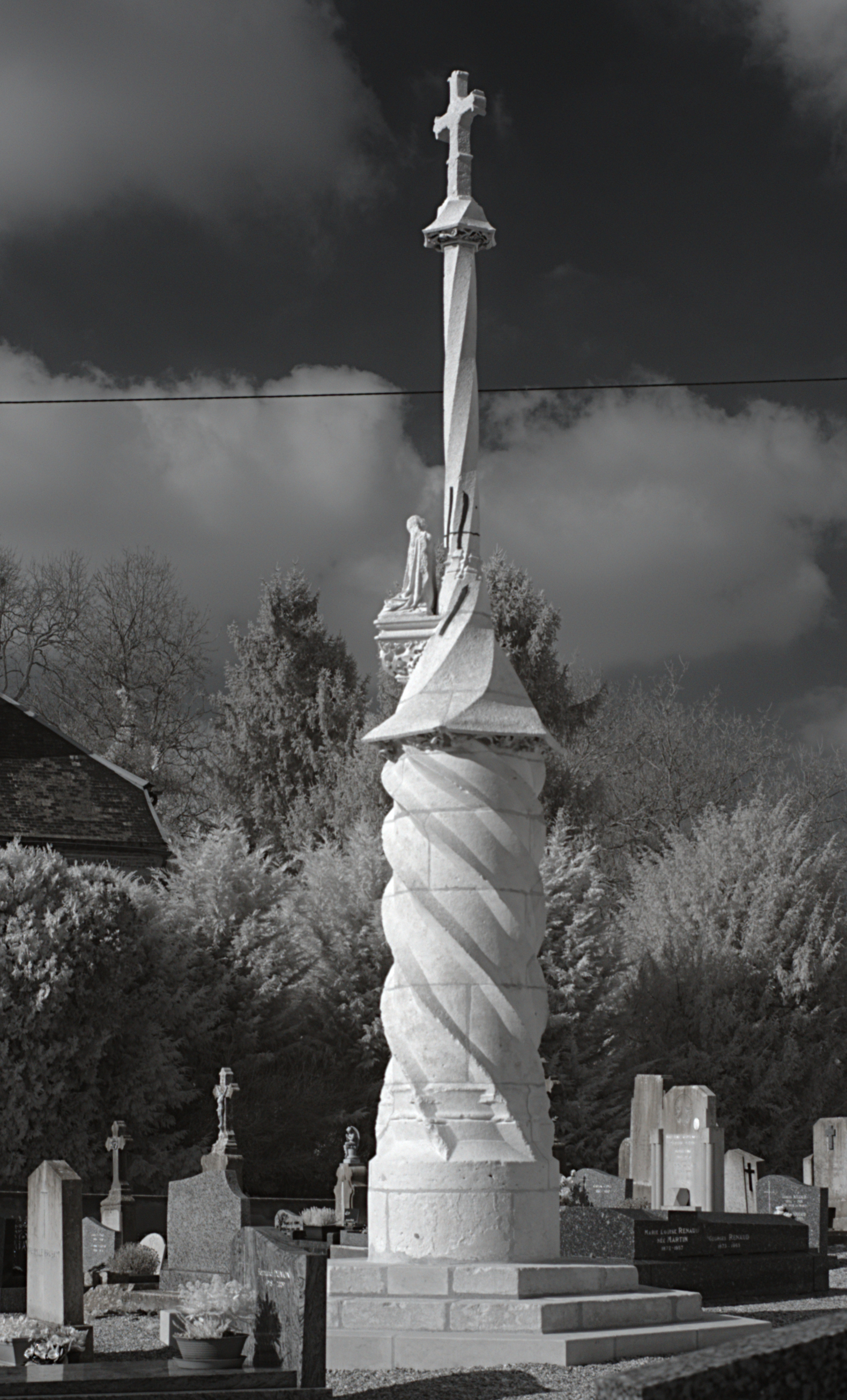 Croix de cimetière, Pagny-la-Ville (Côte d'Or, Bourgogne, France) photographié avec un filtre infrarouge 760 nm.